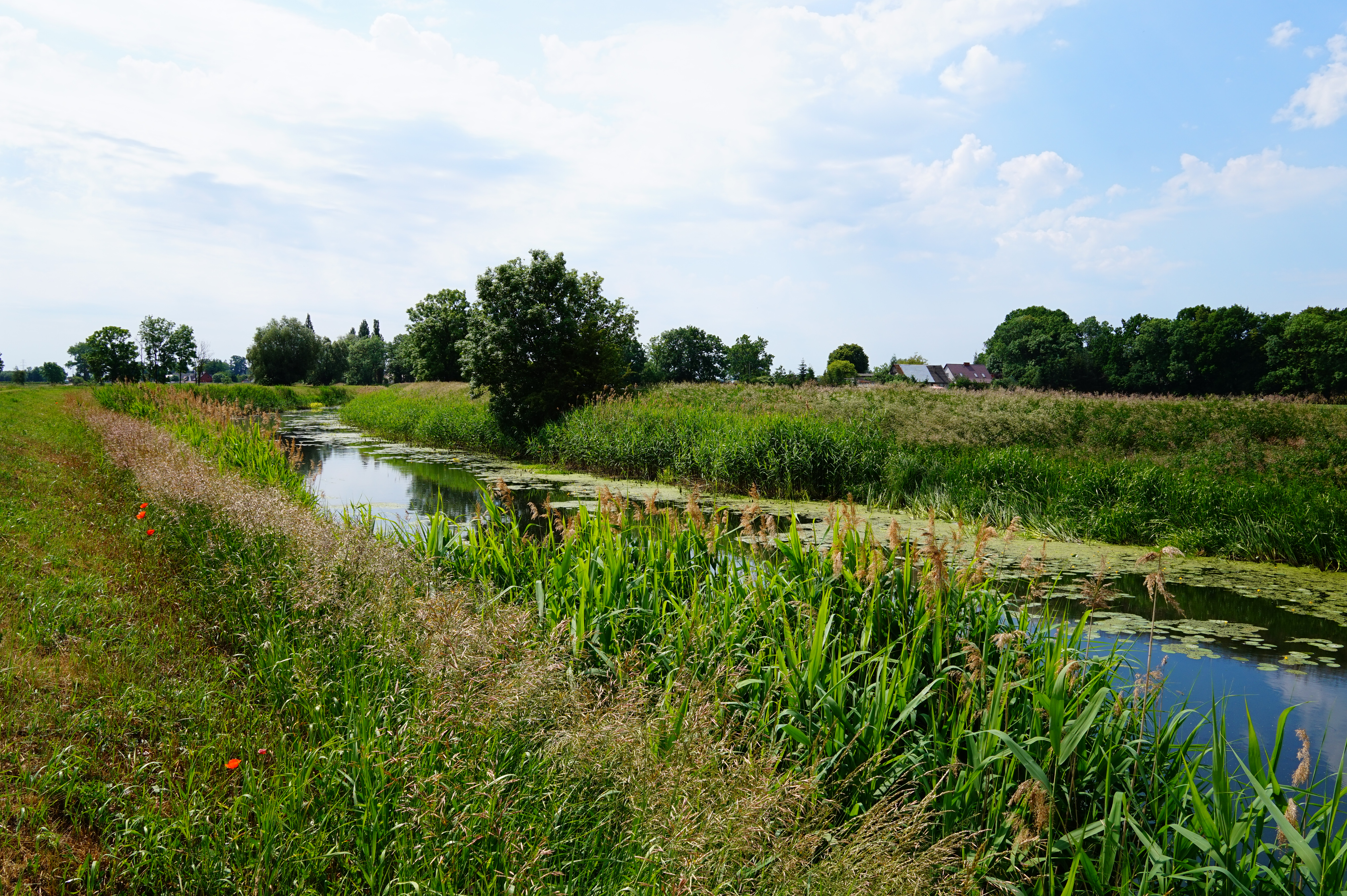 Motława. Wieś Lędowo (2)